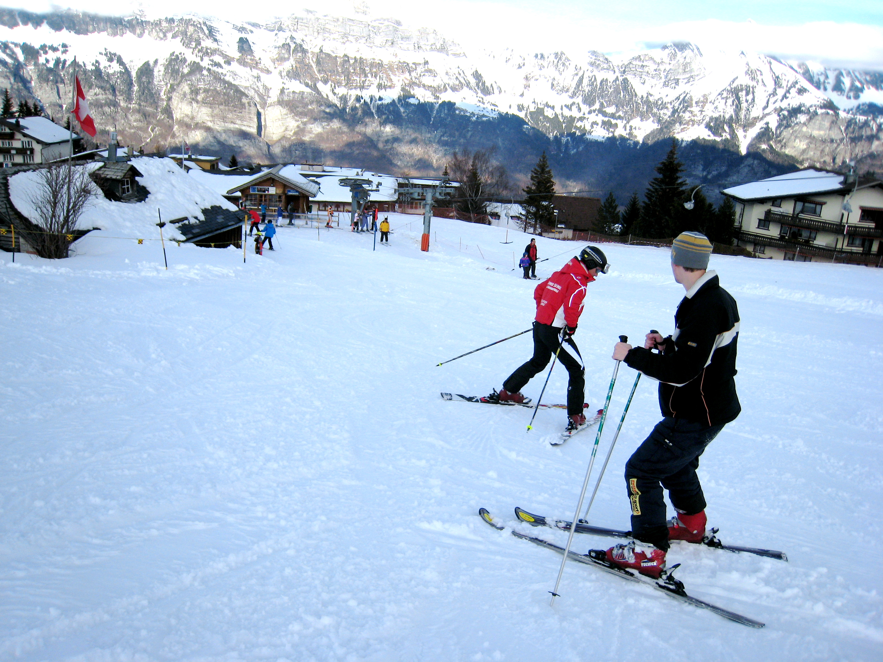 Skiing lesson at Flumserberg.